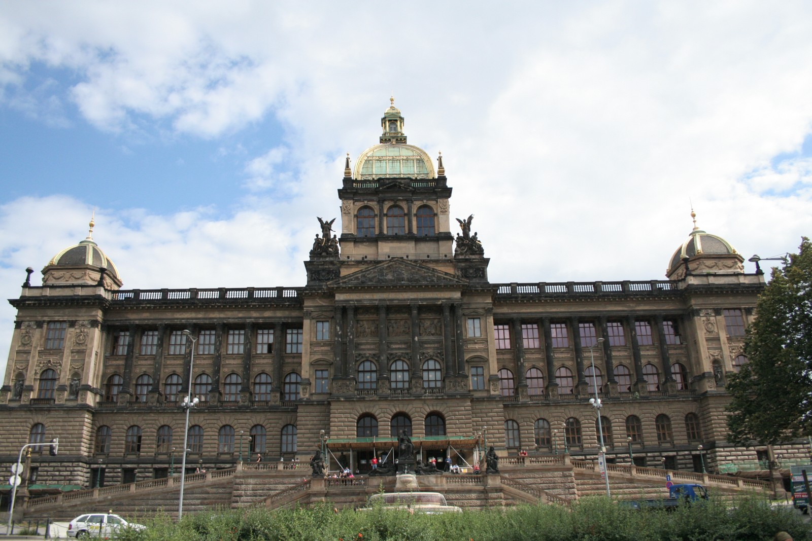 Prager Nationalmuseum Selbst fotografiert im Jahr 2006 Author: Sigi Kiermayer alias Sicaine